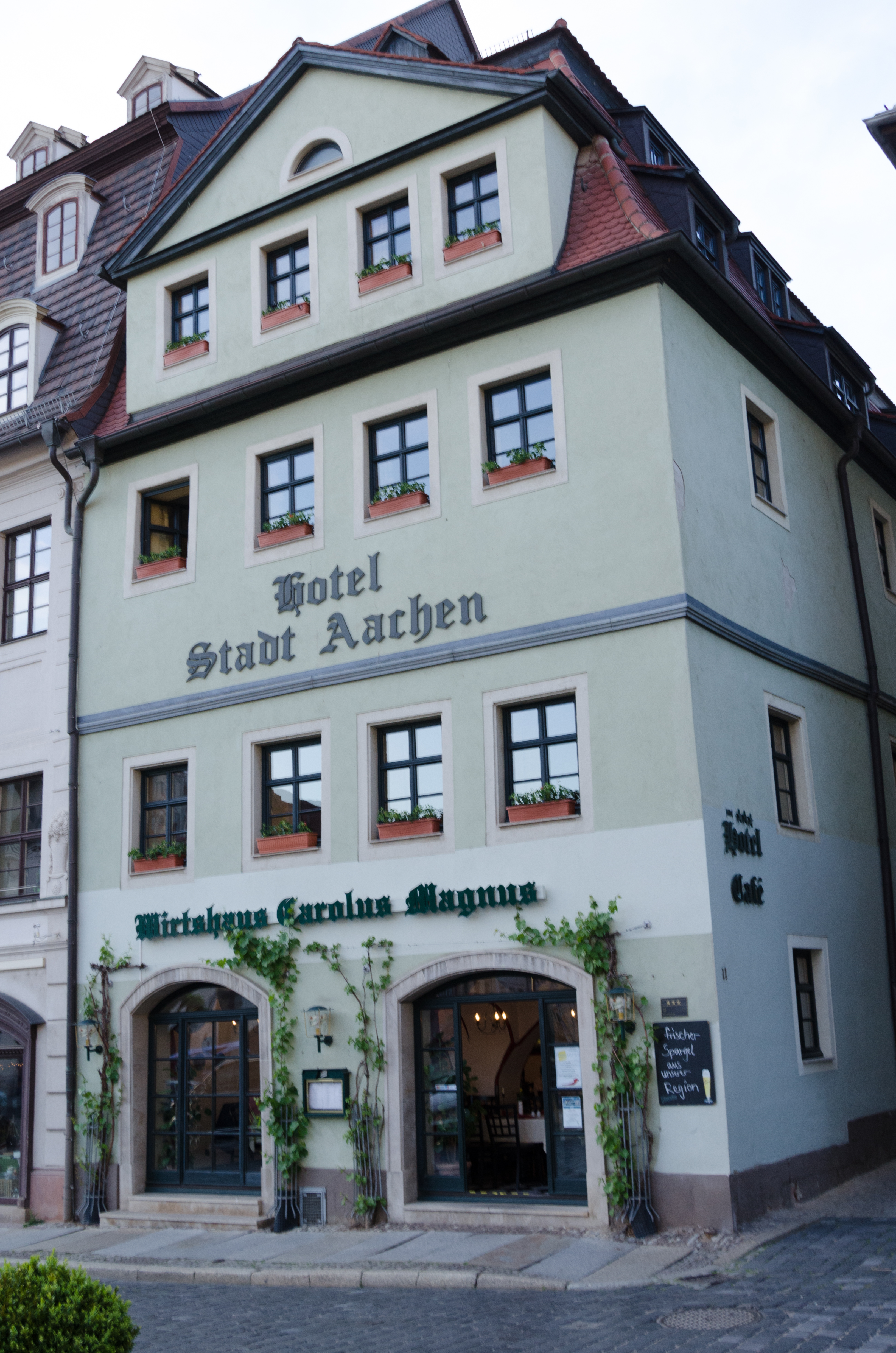 Naumburg, Markt 11